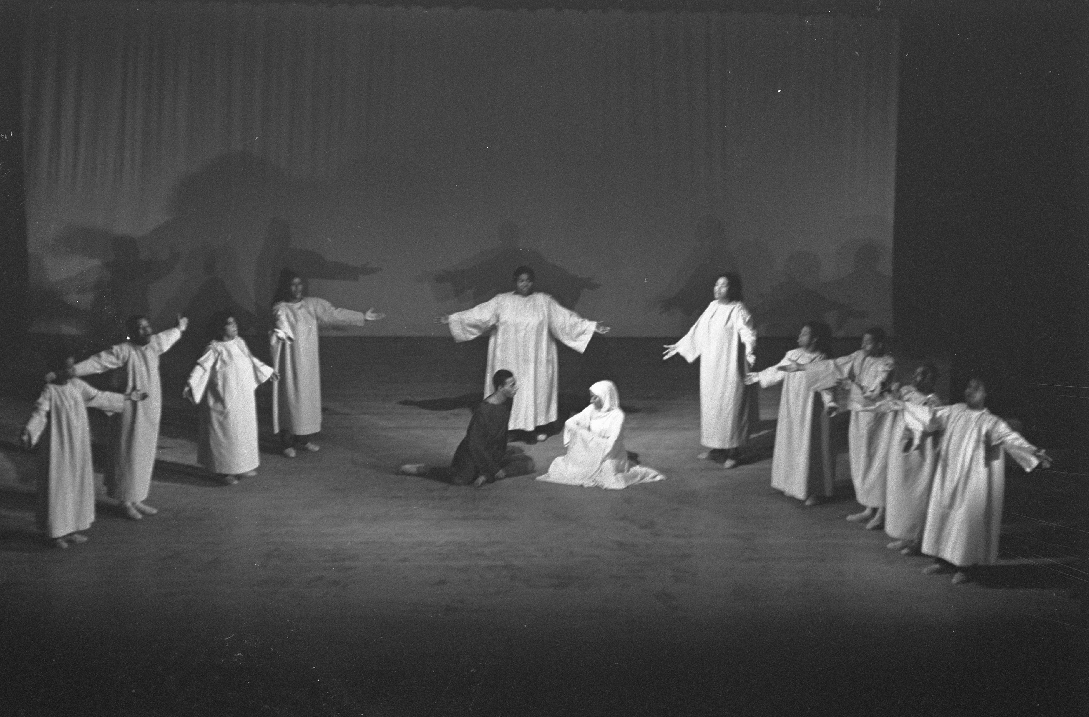 Collectie / Archief : Fotocollectie Anefo Reportage / Serie : [ onbekend ] Beschrijving : Negro Musical Black Nativity in Rotterdam Datum : 24 november 1962 Locatie : Rotterdam, Zuid-Holland Persoonsnaam : Negro Musical Fotograaf : Koch, Eric / Anefo Auteursrechthebbende : Nationaal Archief Materiaalsoort : Negatief (zwart/wit) Nummer archiefinventaris : bekijk toegang 2.24.01.05 Bestanddeelnummer : 914-5424